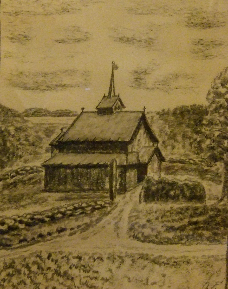 Tegning av Gåra stavkirke, revet 1850. Fra Telemark Museums samling i Digitalt museum.